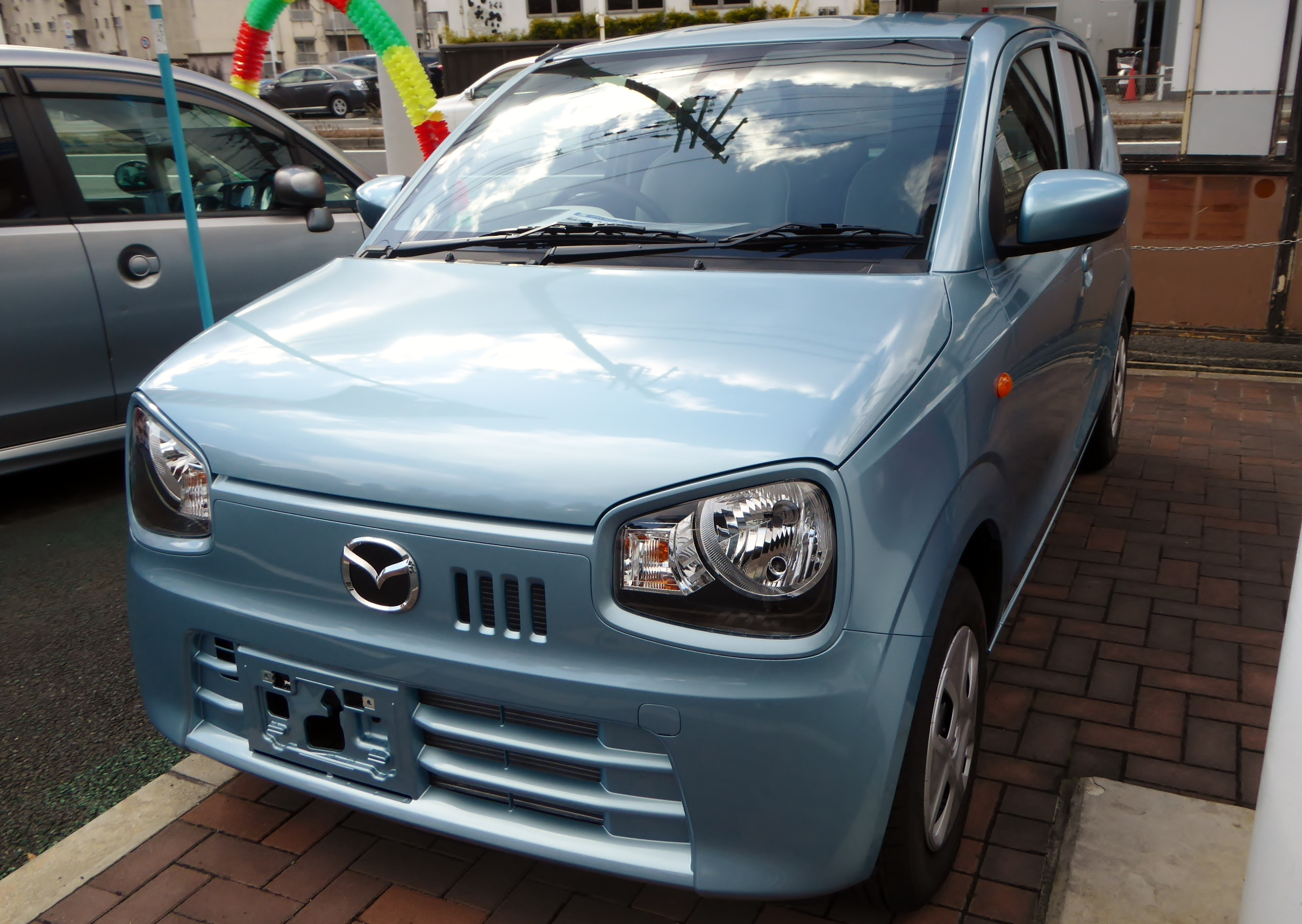 HB36S型マツダ・キャロルGSをフロントから撮影。